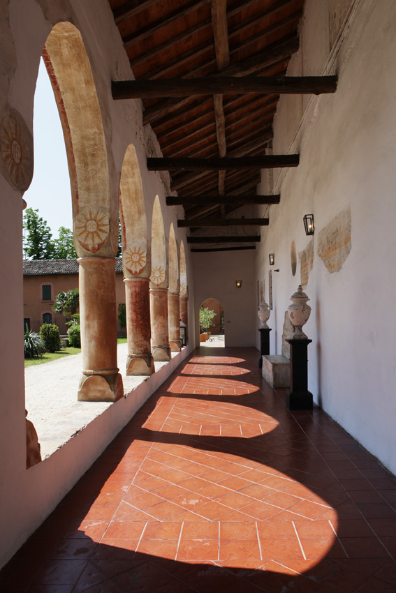 Parte restante dei chiostri gotici affrescati del convento dell'Annunciata di Medole. Secolo XV.